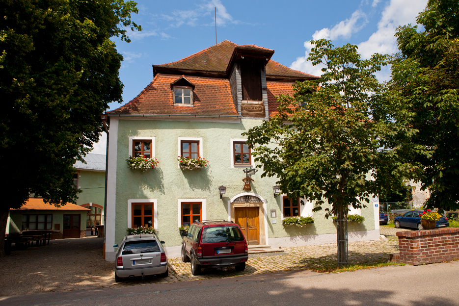 Gaststätte Röhrl in Eilsbrunn, Oberpfalz